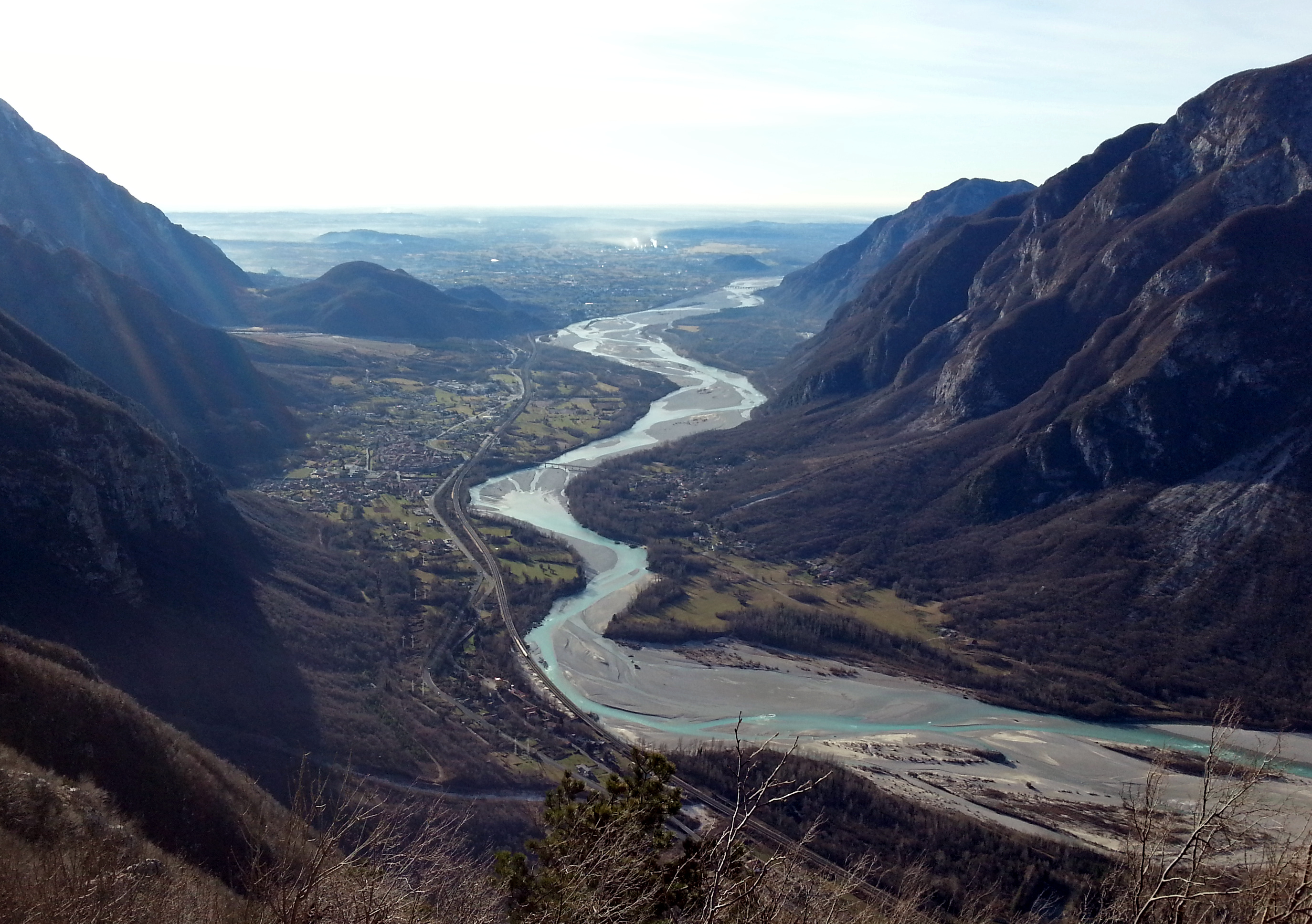 Piana del Tagliamento dall'osservatorio militare di Monte Soreli. Al centro il colle del forte di Monte Ercole. (Ospedaletto di Gemona - Venzone regione Friuli-Venezia Giulia)